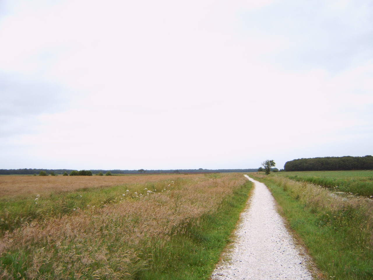 eigen foto, gemaakt door Martin van Dalen Beeld van het Zevenwoudenpad, Lindevallei tussen Boekelte en Nijeberkoop. On Zevenwoudenpad hiking trail, Linde valley between Boekelte and Nijerberkoop